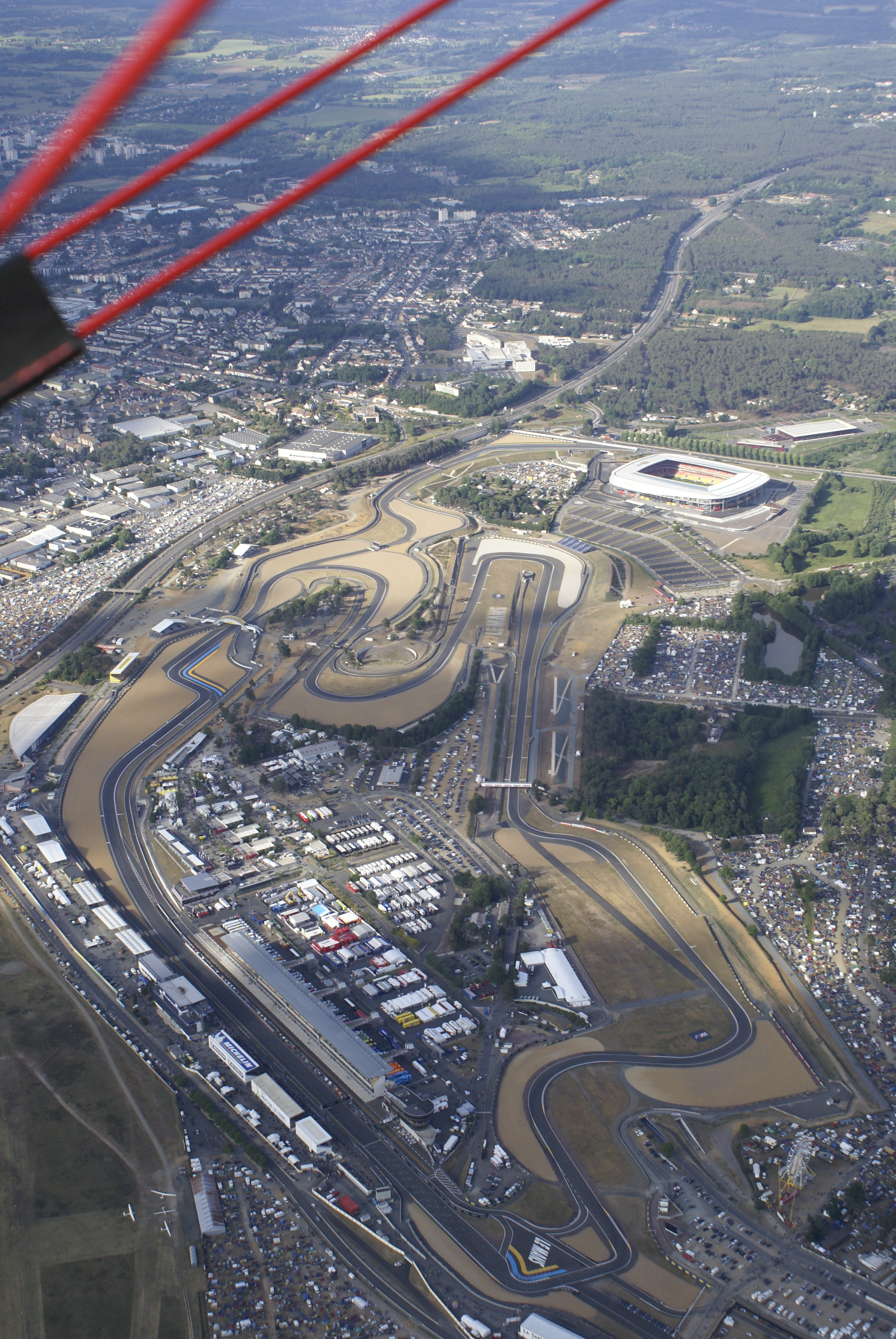 Vol ULM, circuit bugatti